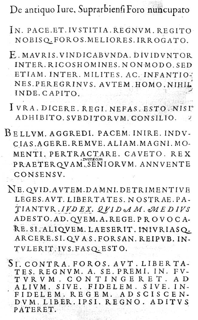 Composición de los Fueros de Sobrarbe contenidos en Aragonensium rerum commentarii de Jerónimo Blancas. Advertencia: esta imagen es una composición editada de cinco fragmentos distintos de las páginas 25, 26 y 28 del Aragonensium Rerum Commentarii, creada para ilustrar un artículo sobre los Fueros de Sobrarbe. Como tal composición, no es una reproducción fidedigna del original.